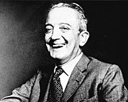 José "Pepe" Bianco